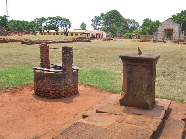 Aljibe y reloj de sol, en las reducciones de San Cosme y Damián, Departamento de Itapúa, Paraguay.